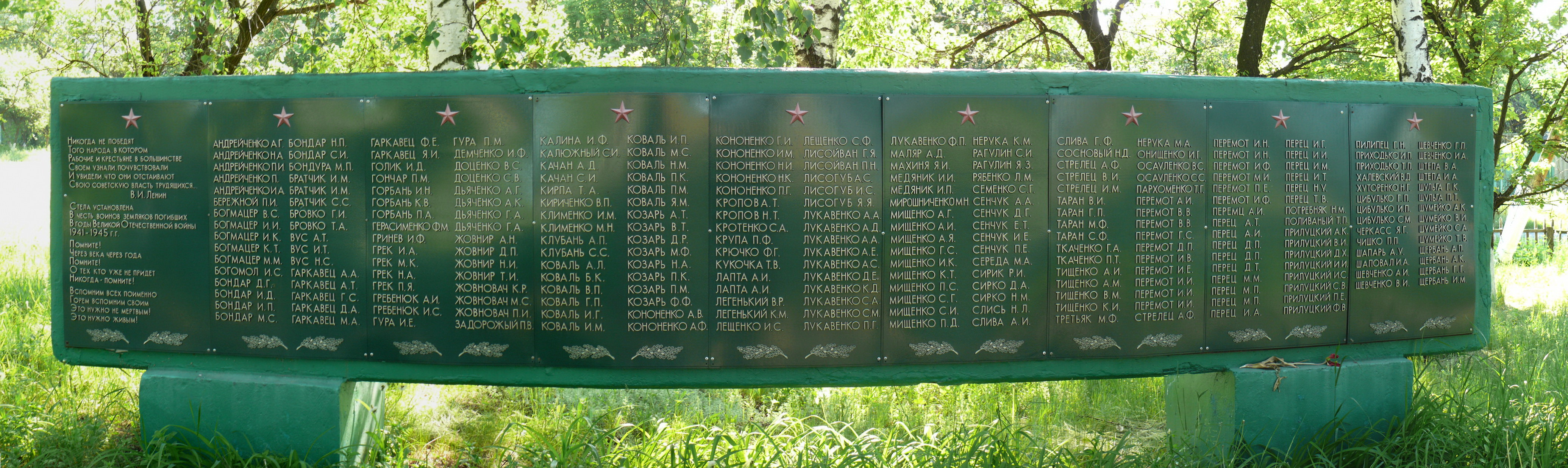 Имена погибших односельчан на стеле мемориала.